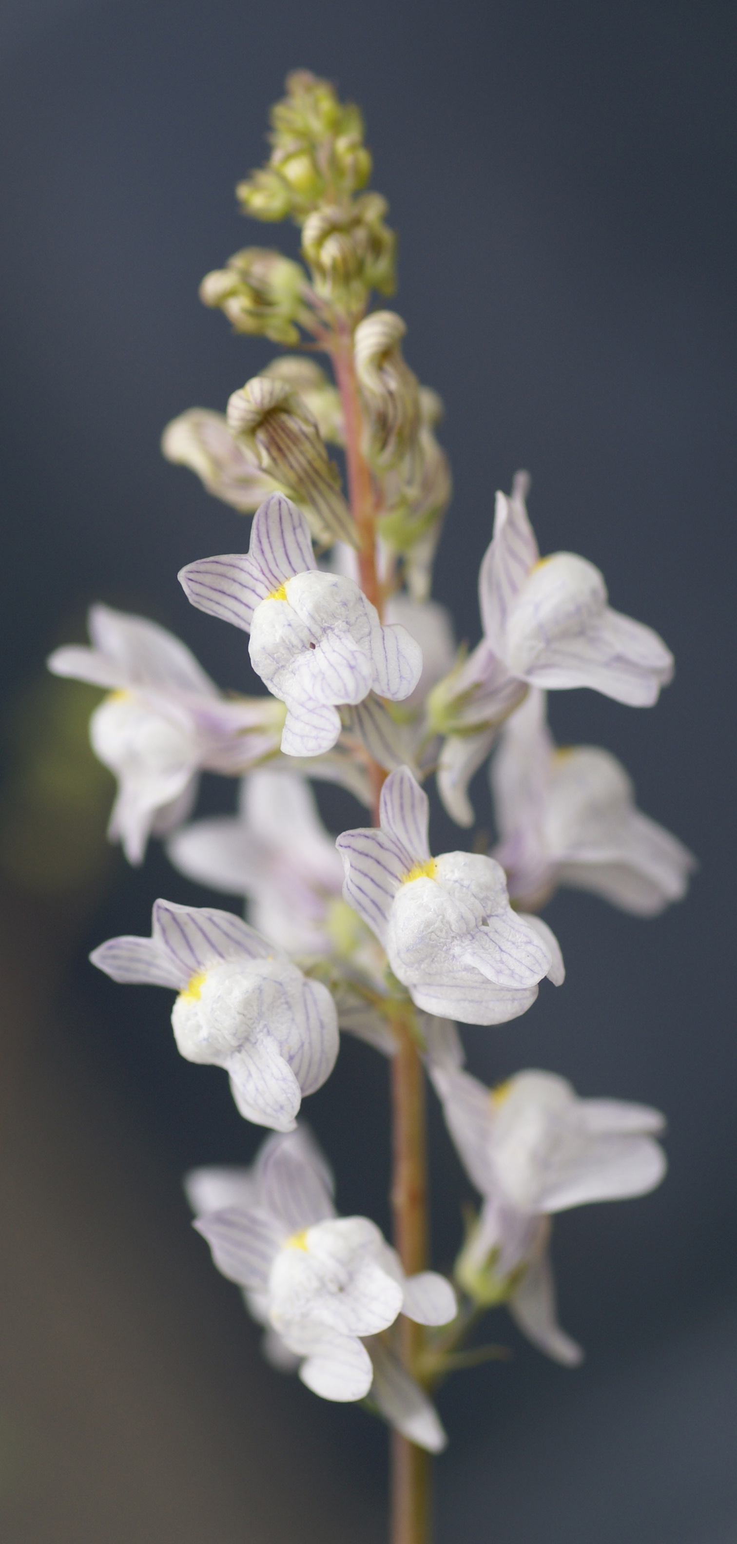 Plant species Linaria repens